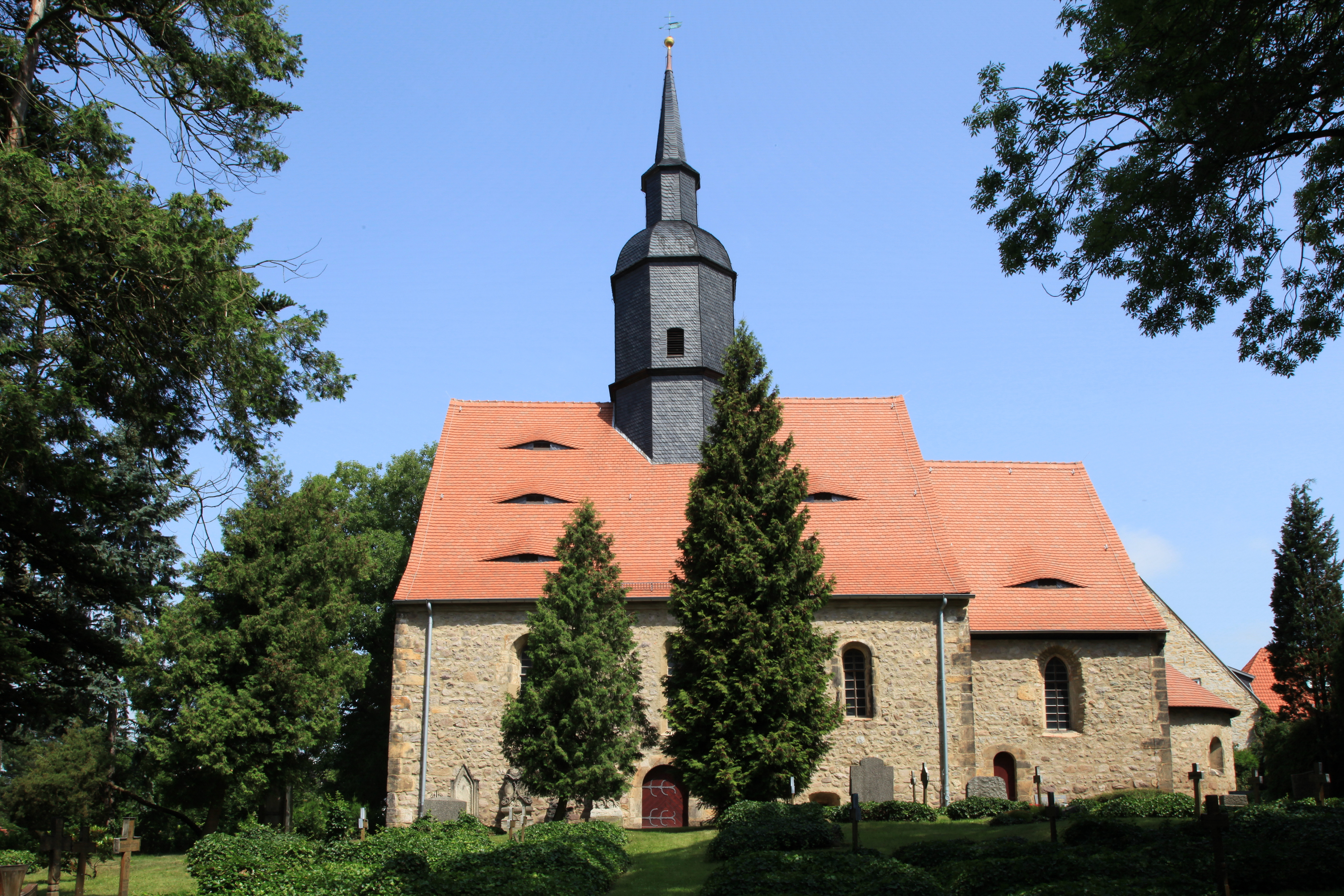 Jakobikirche, Am Ehrenfriedhof in Wilsdruff